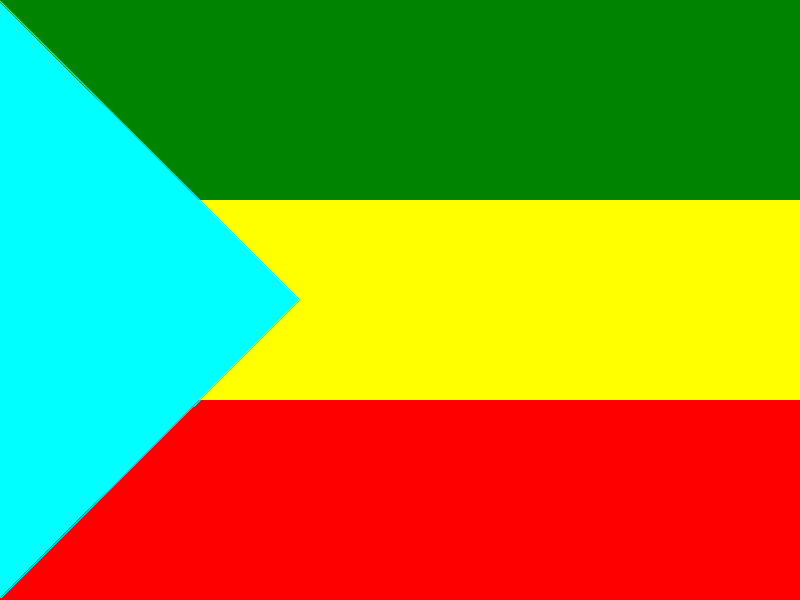 Bandera Pradera (Valle del Cauca)